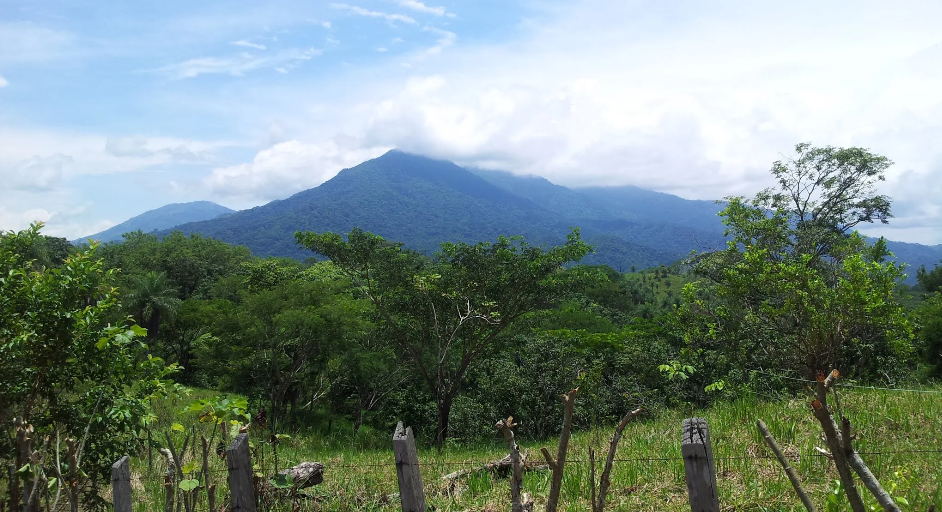 Cerro Turrubares, en el cantón de Turrubares, Costa Rica.